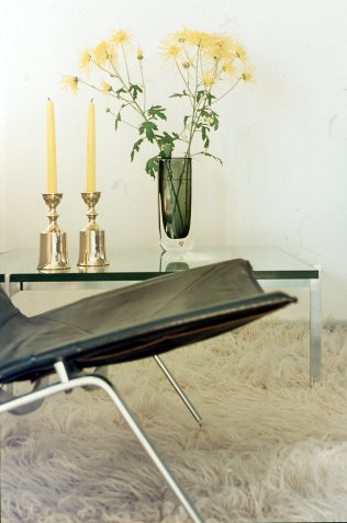 Møbelkunst. Kjærholm (Poul Kjærholm?) stol og bord